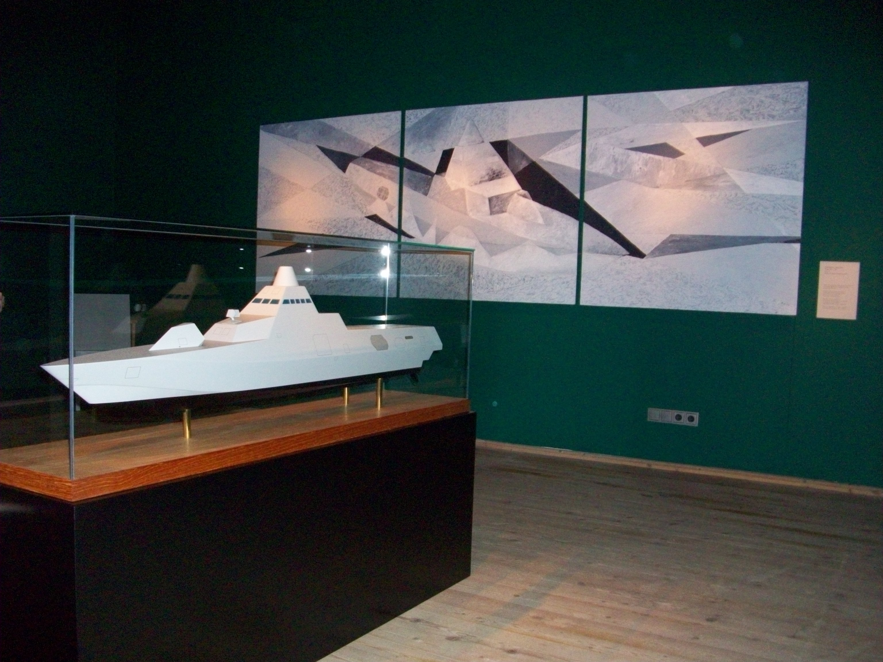 Målning på Marinmuseet i Karlskrona